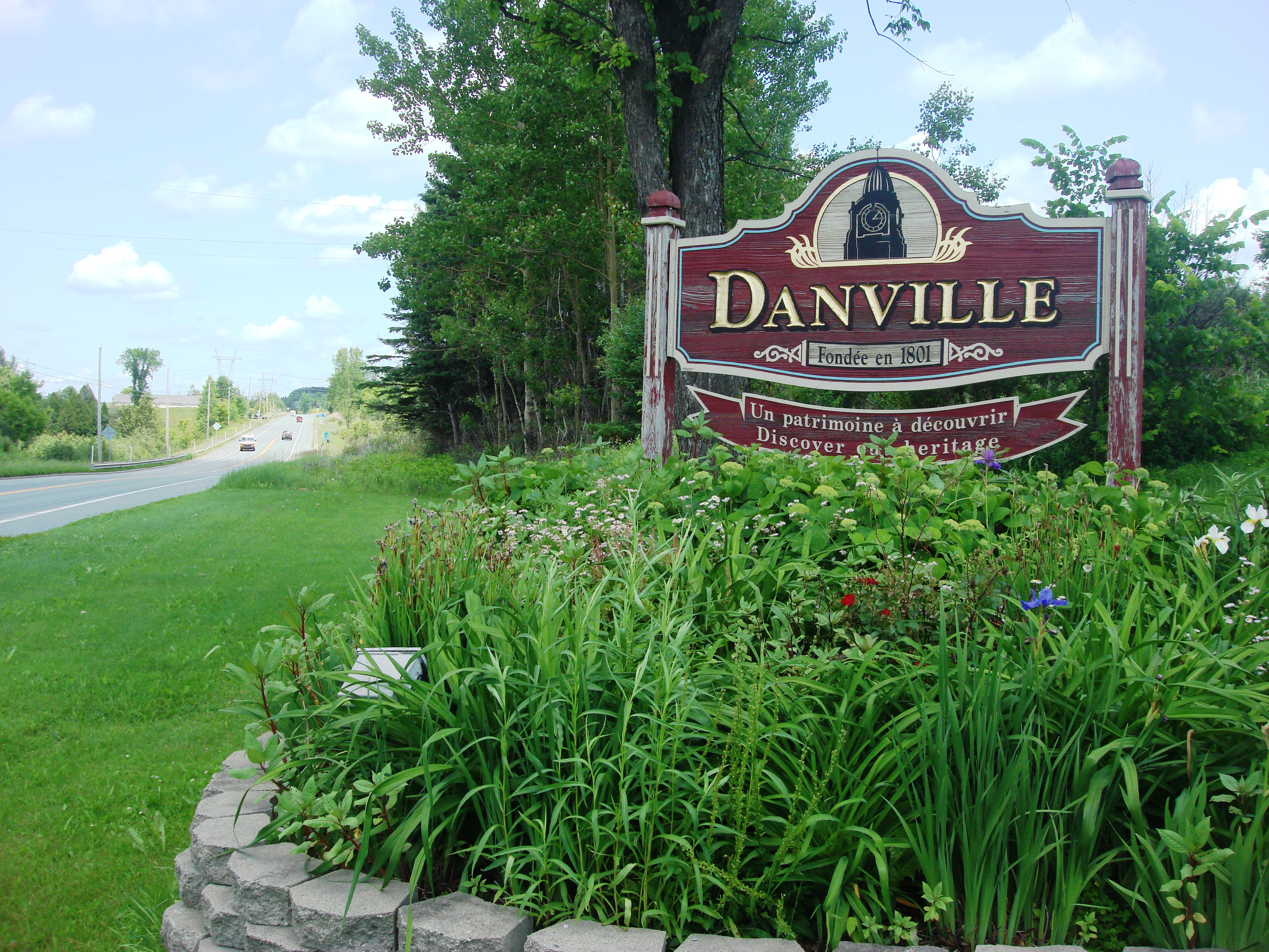 Bienvenue à Danville